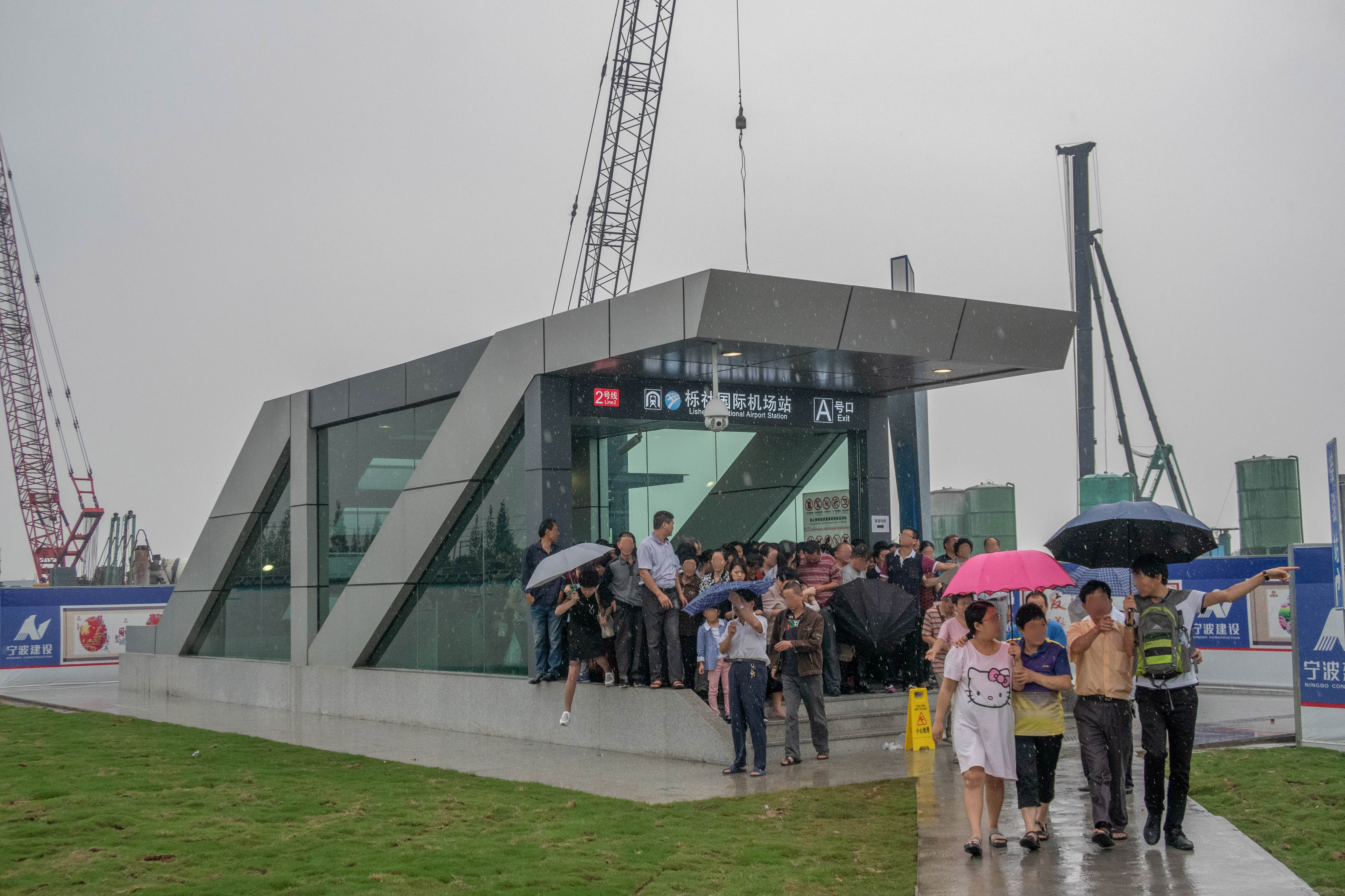 宁波轨道交通栎社国际机场站